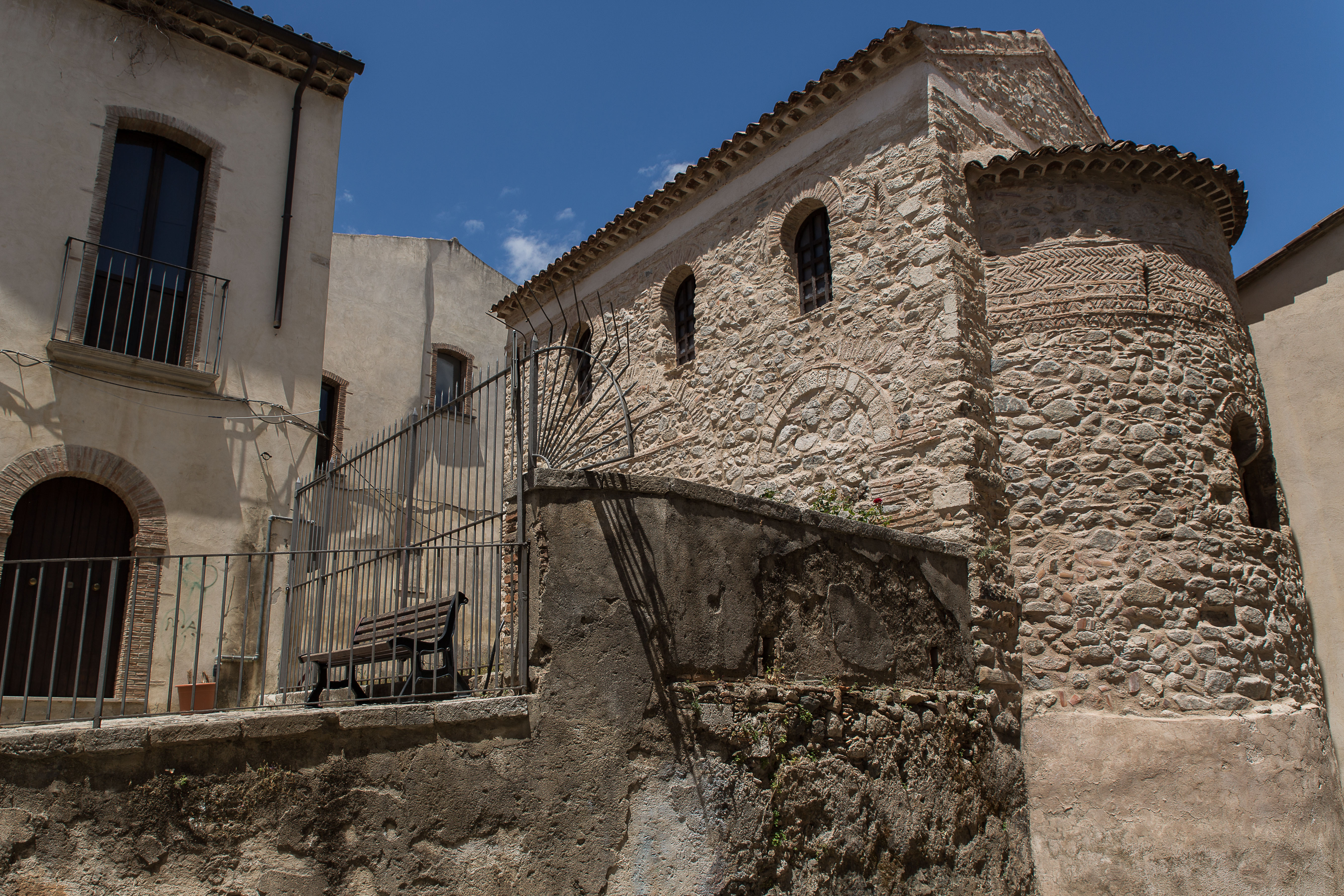 Panaghia This is a photo of a monument which is part of cultural heritage of Italy.